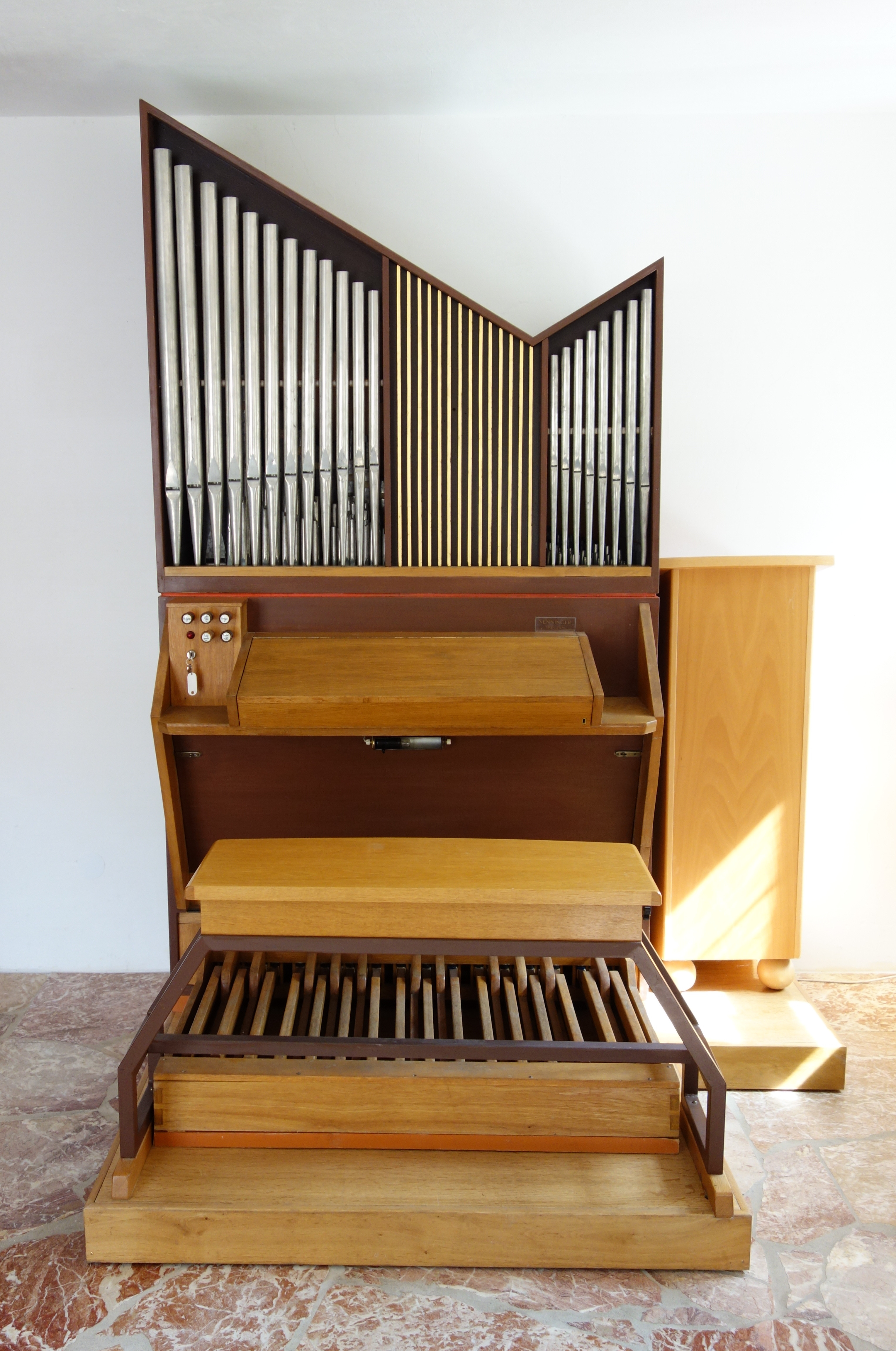 Nenninger-Kleinorgel im Orgelzentrum Valley (ca. 1960, G. Nenninger, I/5, Pedal fest angehängt)